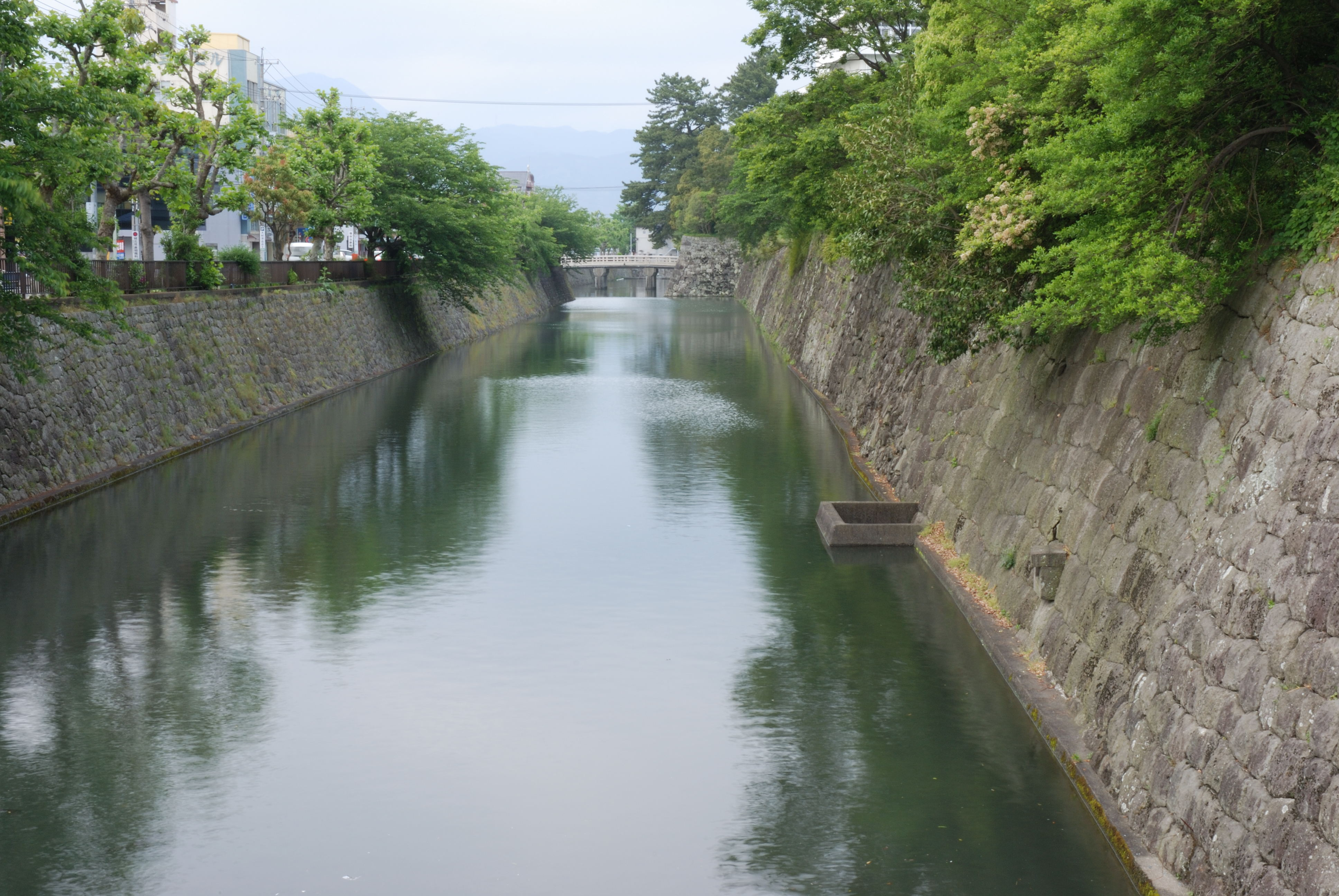 Sotobori